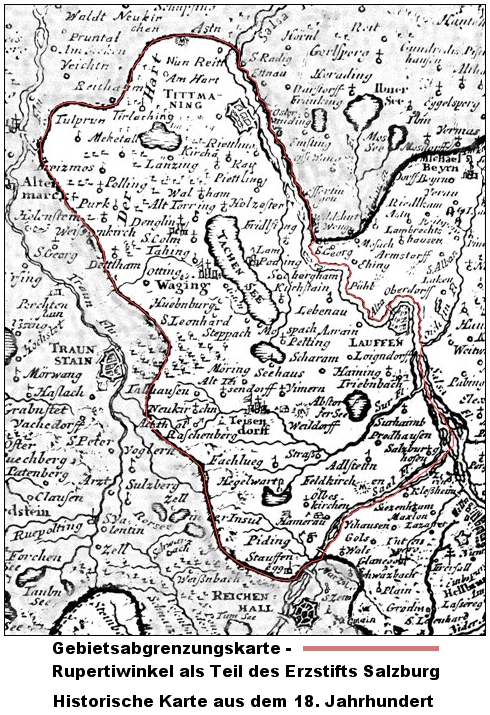 Gebietsabgrenzungskarte -Rupertiwinkel- als Teil des Erzstift Salzburg. Kopie einer historischen Karte des Erzstift Salzburg aus dem 18. Jahrhundert, rot umrandet das Gebiet des Rupertiwinkel.